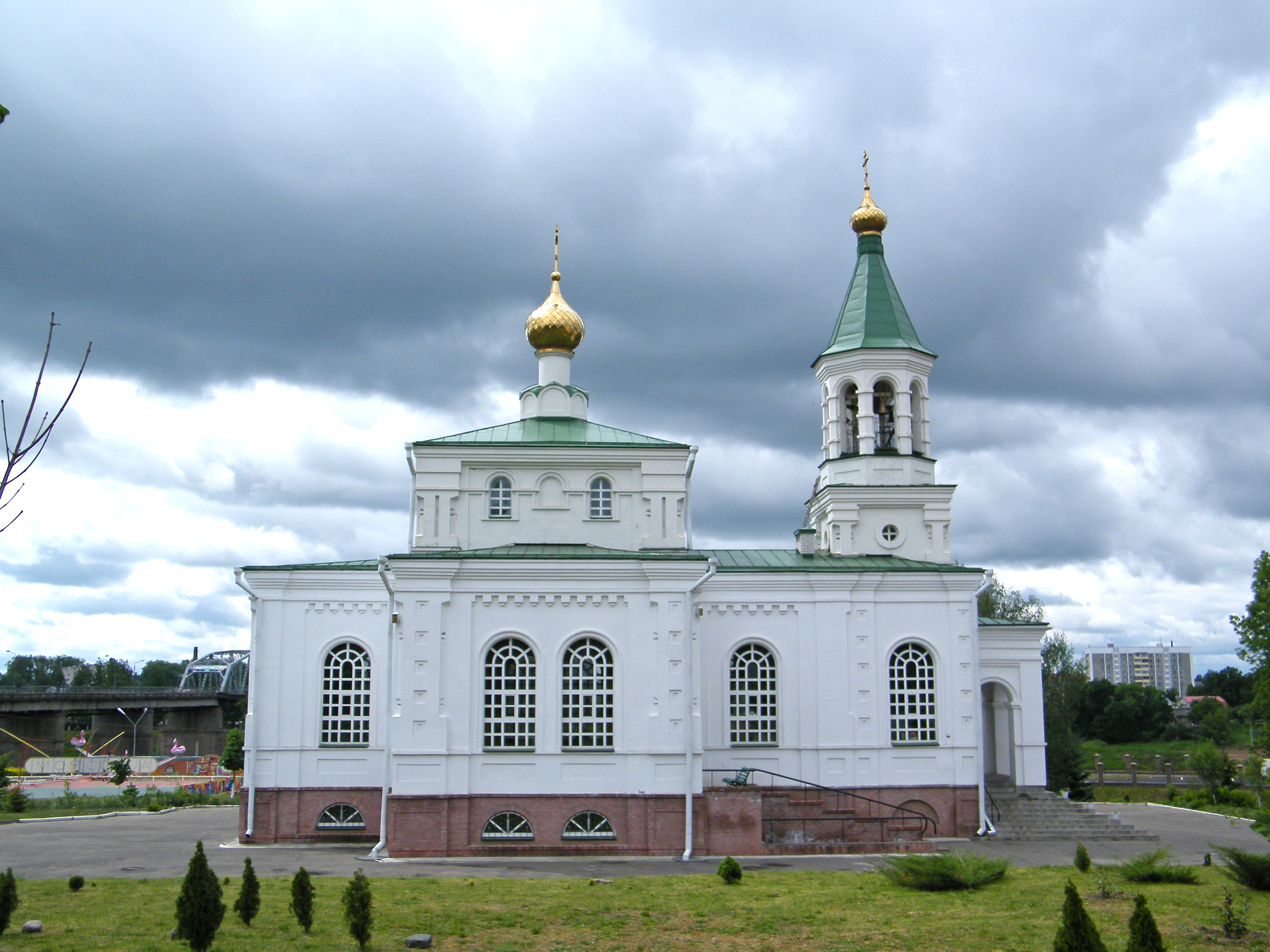 Свято-Покровская церковь